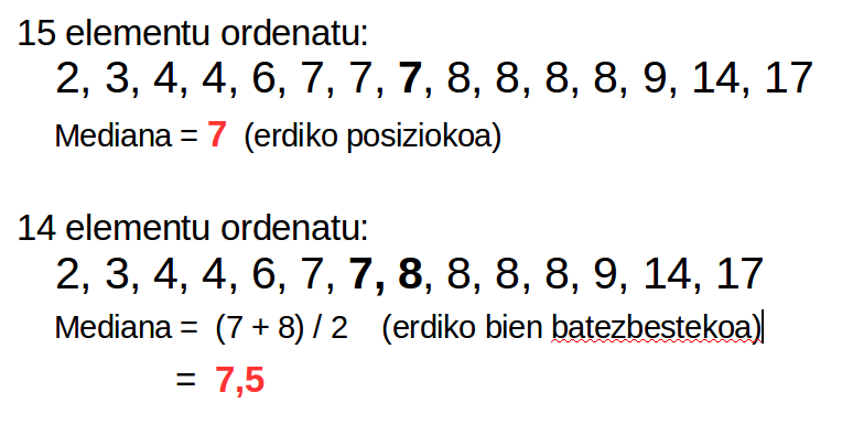 Hainbat zenbaki ordenaturen mediana kalkulatzeko bi adibide, Jone Uriaren bertsoan erabilitako adibideak dira.